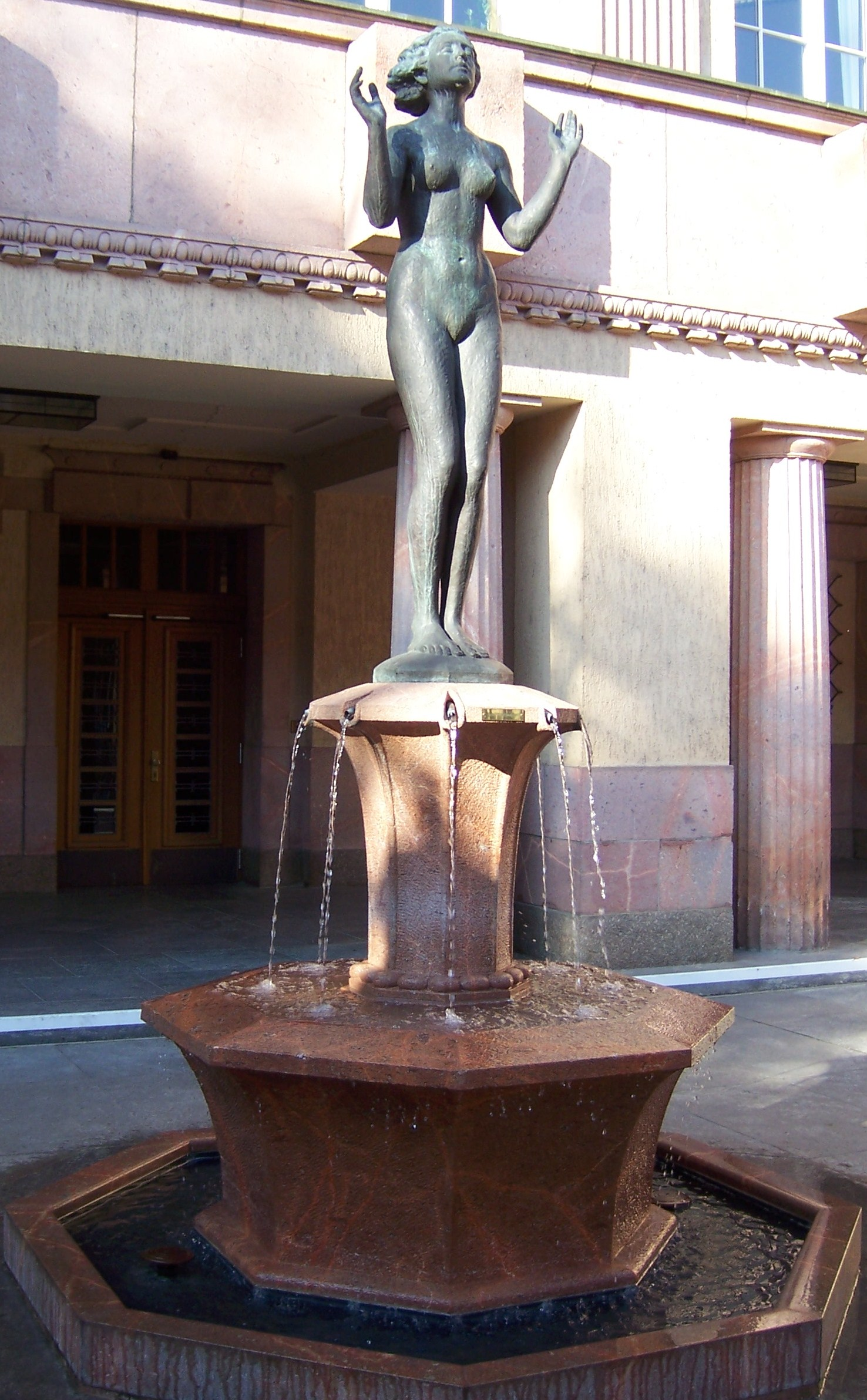 Felix Pfeifer: Genesende, Brunnenfigur